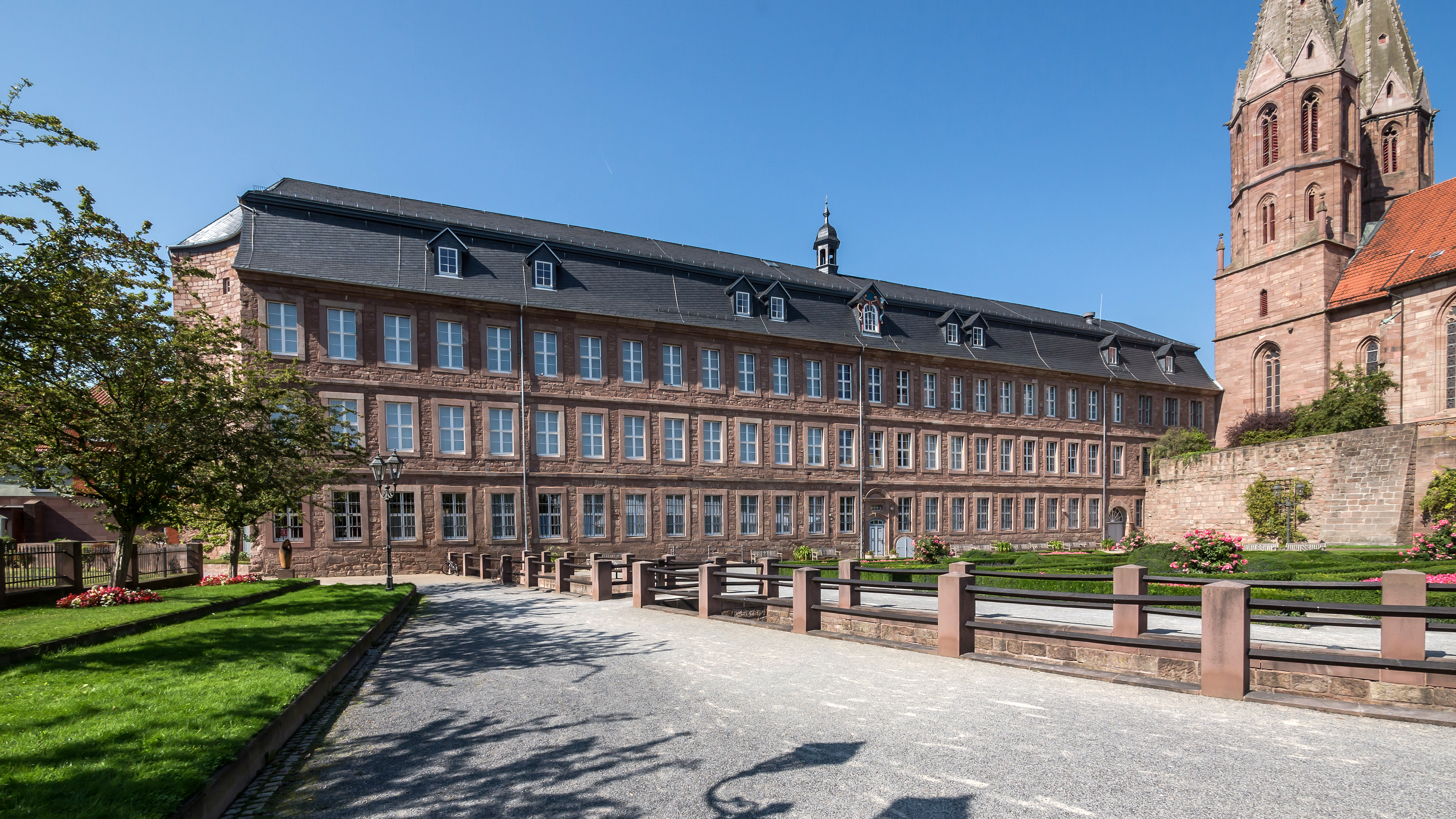 Heilbad Heiligenstadt Kollegiengasse 10 Jesuitenkolleg Schule Heimatmuseum 1